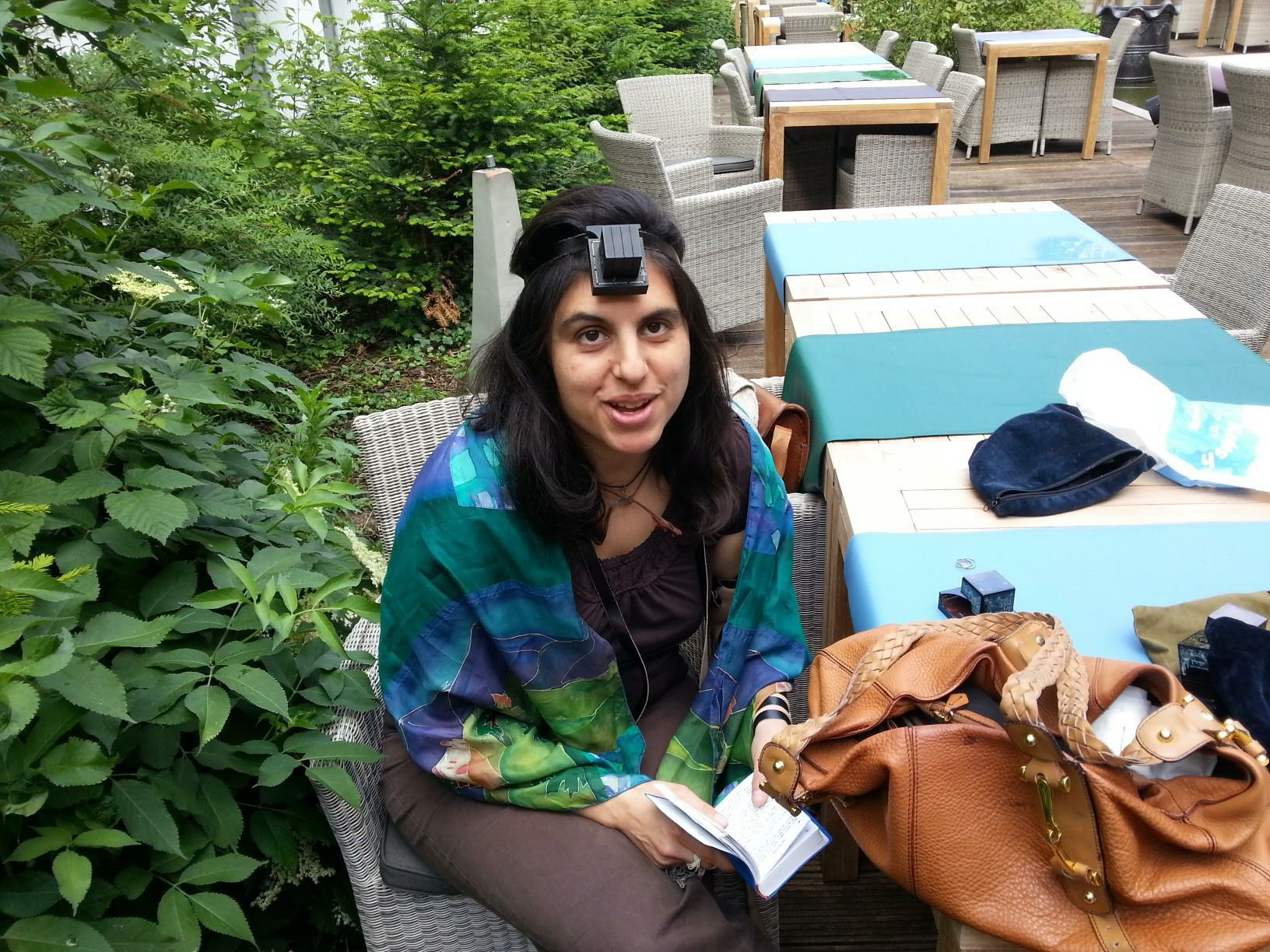 Floriane Chinsky avec talith et tefilims